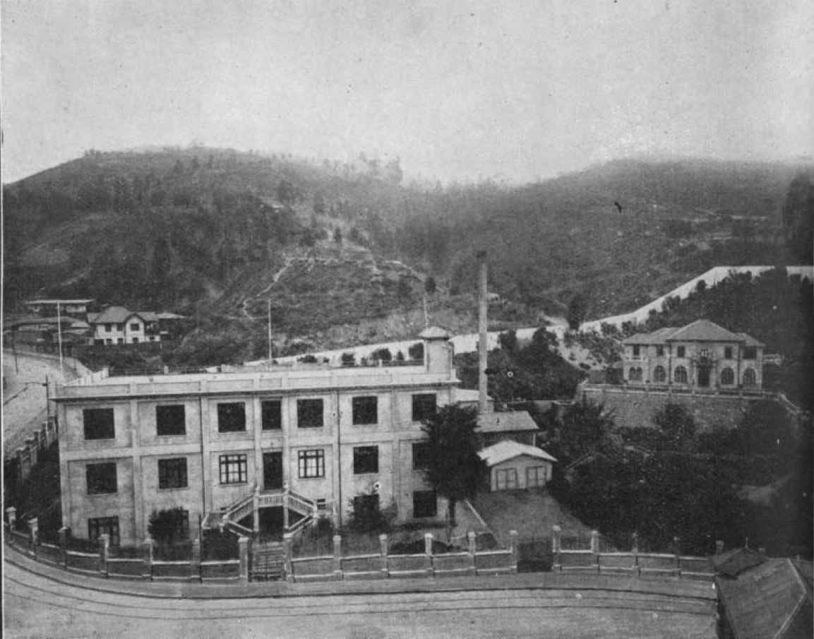 "Fachada de la Fabrica de Confites y Chocolates «Federico Costa», ubicada en la Quinta Costa, Av. Santa Elena. - Valparaíso". En "El censo comercial industrial de la colonia italiana en Chile : resumen general de las actividades de la colonia" / Amadeo Pellegrini C., J. C. Aprile, 1926. Santiago : Impr. de la Colonia, 1926. 16, 1005 p.